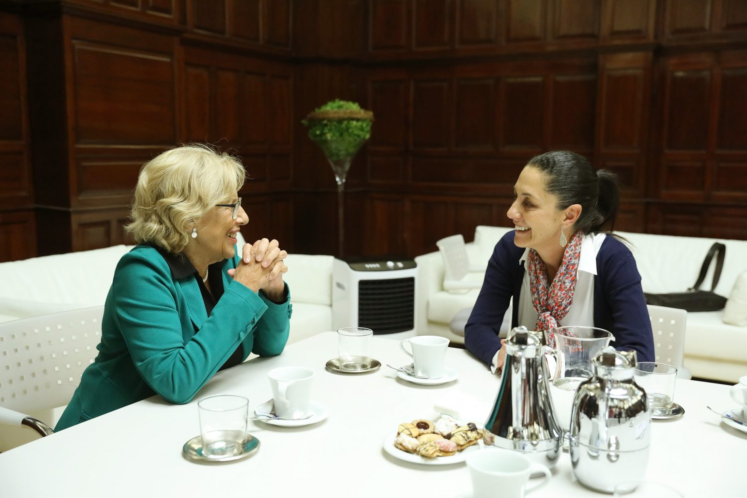 Manuela Carmena se reúne con Claudia Sheinbaum, jefa de Gobierno electa de la capital mexicana. La alcaldesa de Madrid, Manuela Carmena, se ha reunido hoy, lunes 8 de octubre, en el palacio de Cibeles con Claudia Sheinbaum, primera mujer electa jefa de Gobierno de la Ciudad de México, que se encuentra en Madrid como parte de una serie de contactos que le llevarán a Barcelona y posteriormente a París. «Teníamos ya un acuerdo de colaboración con la Ciudad de México, pero lo vamos reforzar para hacer que sea aún más positivo» para ambas capitales, ha señalado Carmena al término del encuentro.